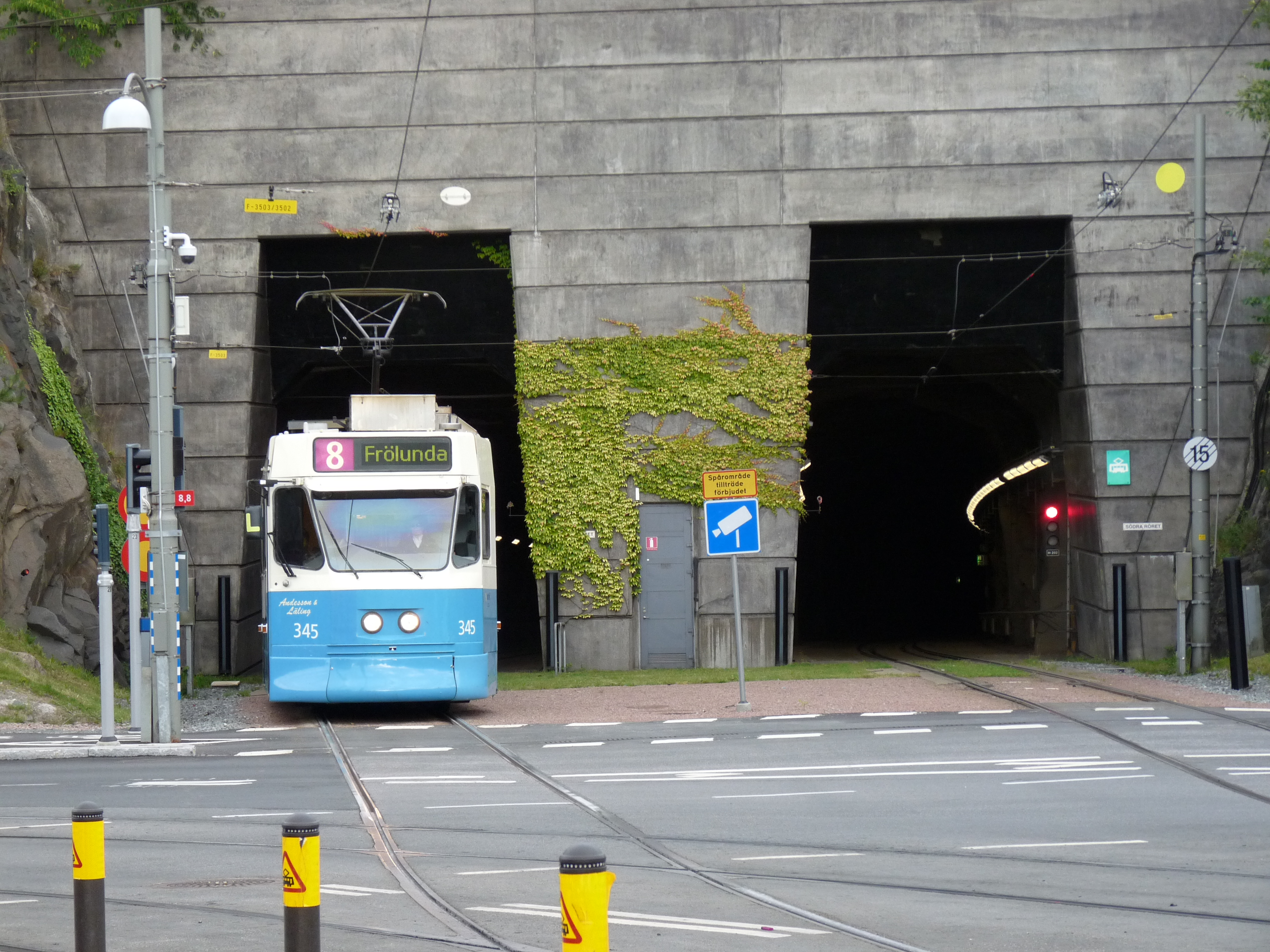 Tramlijn 8 die uit de tunnel komt